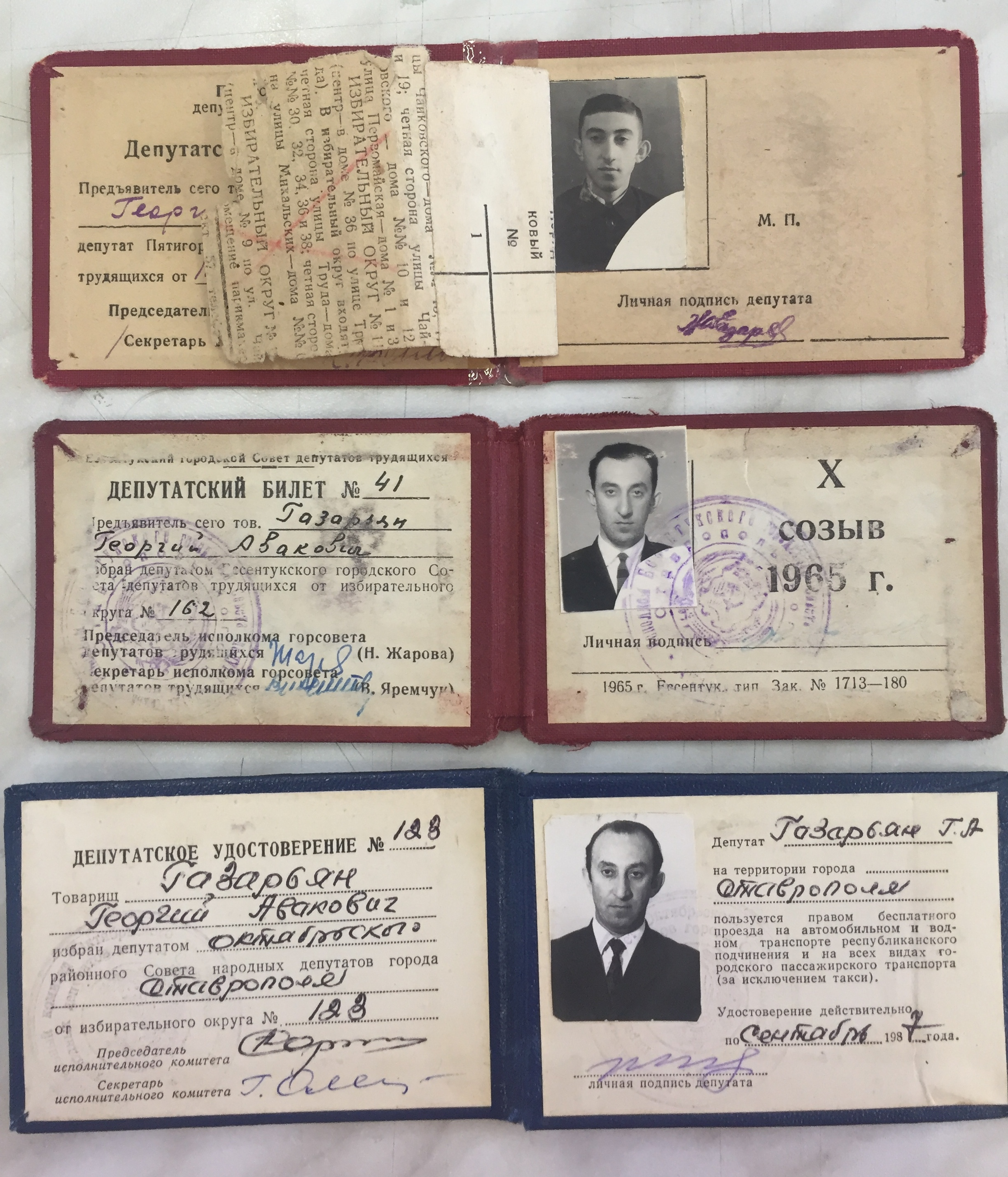 Депутатский билет